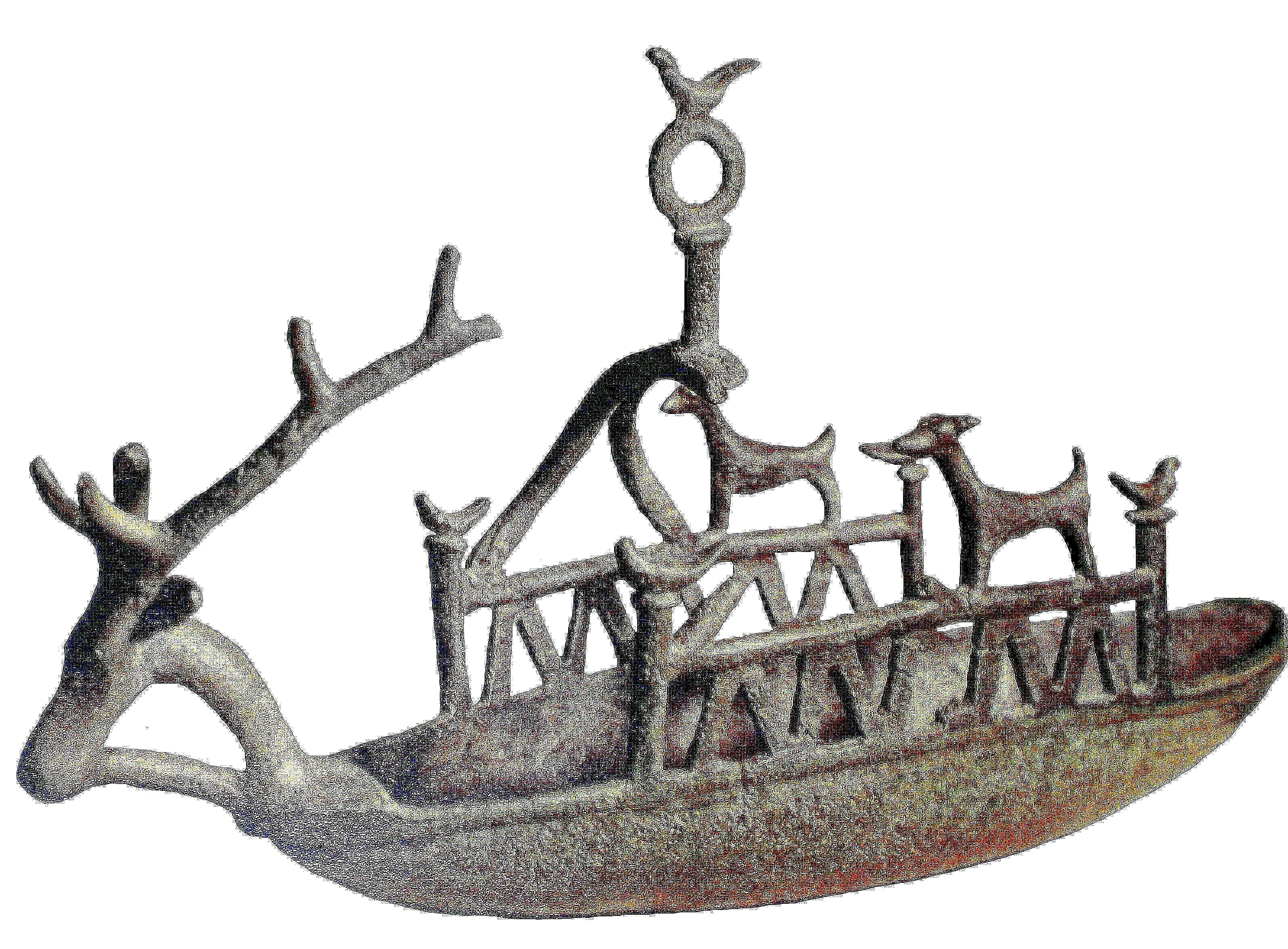 Navicella nuragica